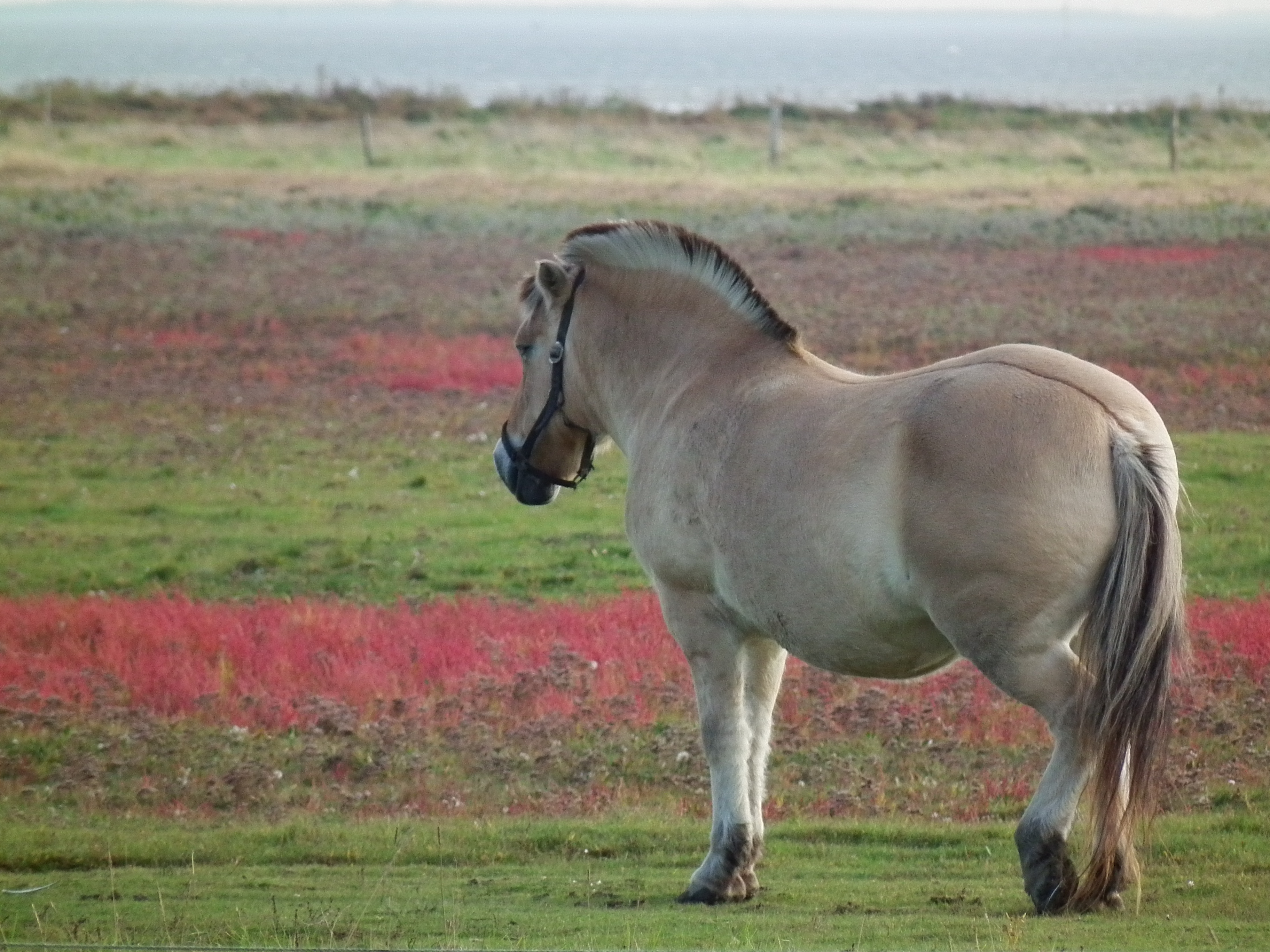 Fjord-Pferd auf einer Salzwiese der ostfriesischen Nordseeinsel Juist (Niedersachsen, Deutschland)